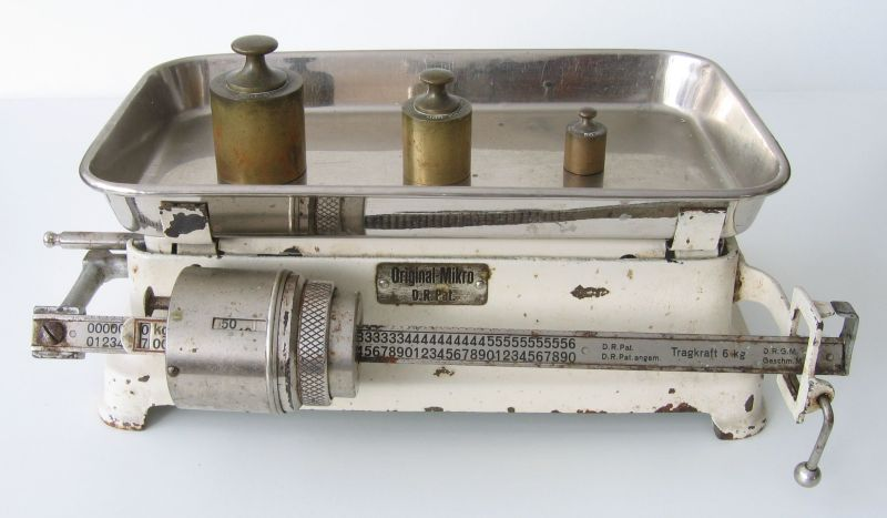 Laufgewichtswage "Mikro" für den Haushalt, um 1935 (abgelesenes Gewicht 750 g)